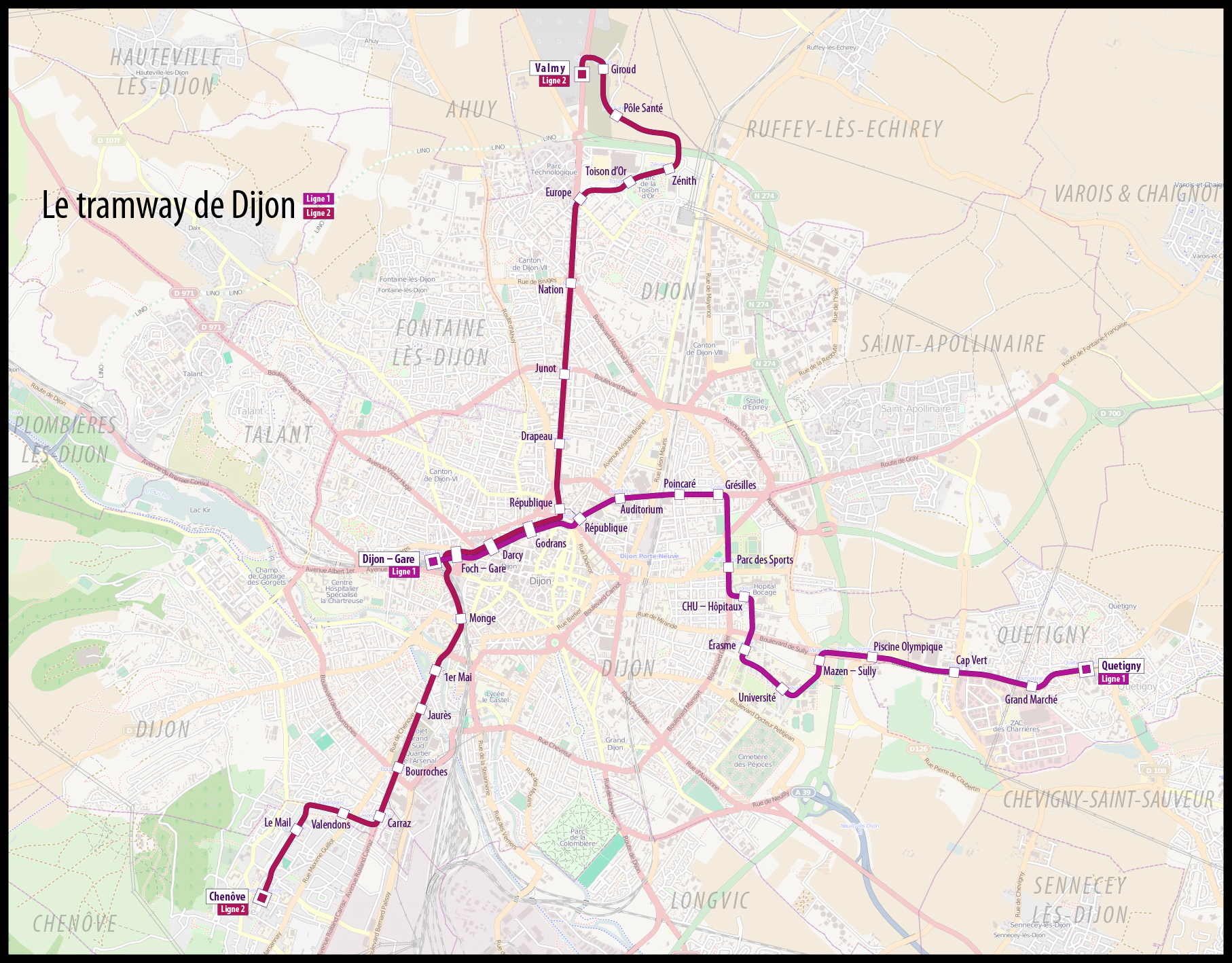 Estremeñu: Carte du tramway de Dijon